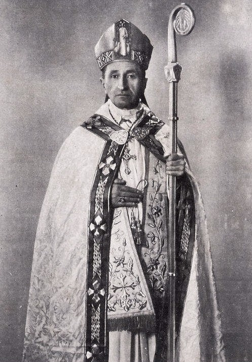 Son Excellence Monseigneur Weber, Evêque de Strasbourg (portrait, en pied). Bibliothèque nationale et universitaire de Strasbourg